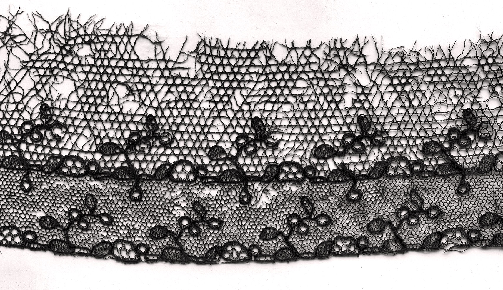 private collection